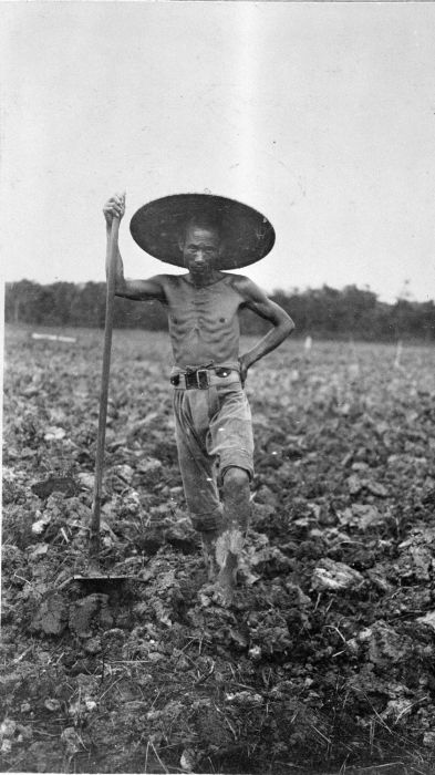 Foto. Koelie in een tabaksveld